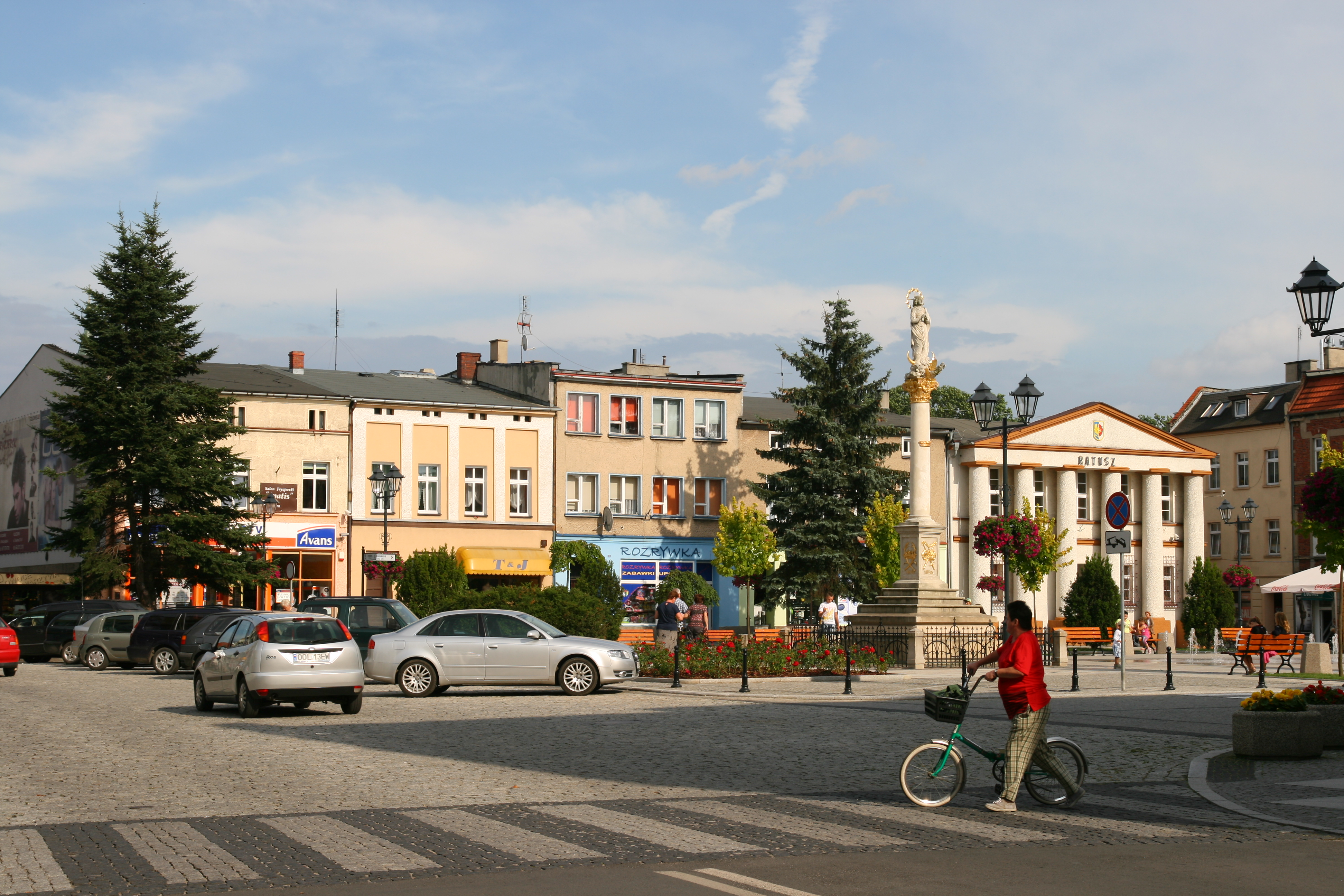 Rynek w Oleśnie.